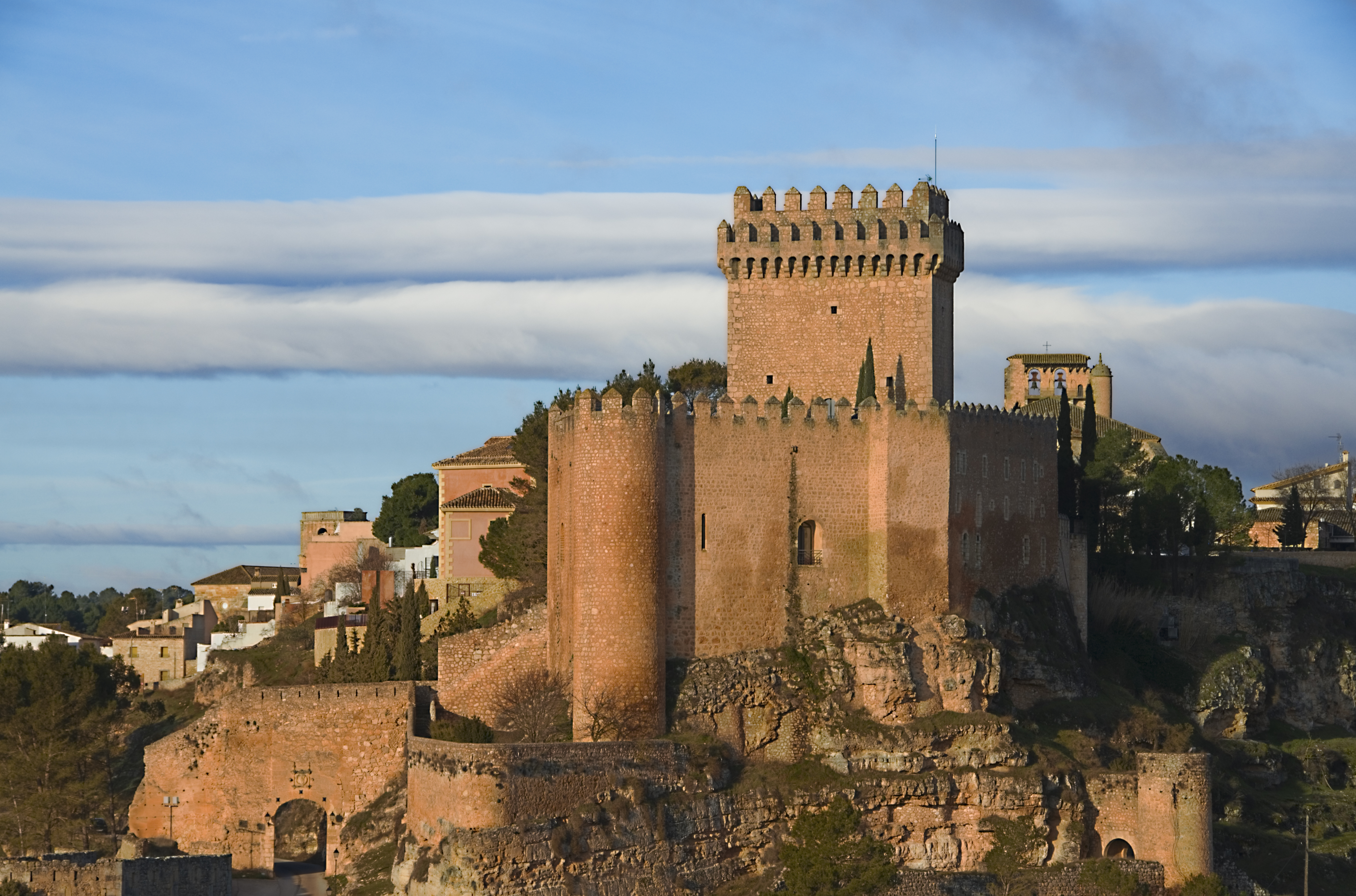 Castillo de las Altas Torres. Alarcón